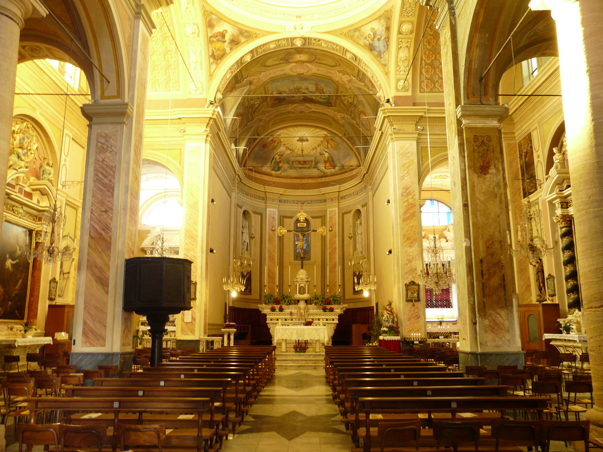 Chiesa dei Santi Giovanni Battista ed Eugenio, Ceriale, Liguria, Italia